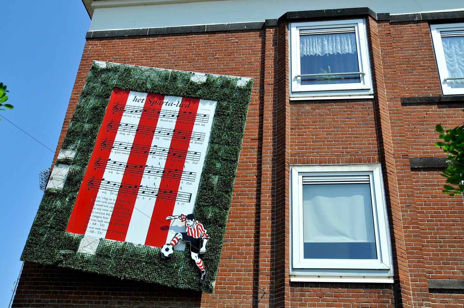 De tekst van het Sparta-lied hangt vlak bij de voormalige hoofdingang aan de muur. Het lied wordt elke wedstrijd 'aangeheven', in elk geval na ieder doelpunt dat Sparta maakt. Een echt prachtig ouderwets voetballied! En ja, het hangt scheef:-) SPARTA-LIED Tekst: J. Wolf, muziek: Jac. Blazer Rood-wit is onze glorie Rood-wit zit ons in’t bloed Bij neerlaag of victorie Bij voor- of tegenspoed Rood-wit gaat nooit verloren En jaren nog hierna Zullen wij laten horen SP-AR-TA Zullen wij laten horen SP-AR-TA Deez’ vlag zij is ons heilig Reeds honderd jaren lang Bij rood-wit zijn wij veilig Zijn wij voor niemand bang Wij zweren bij die kleuren En zingen hoe ’t ook ga Bij wat er ook gebeuren zal SP-AR-TA Bij wat er ook gebeuren zal SP-AR-TA